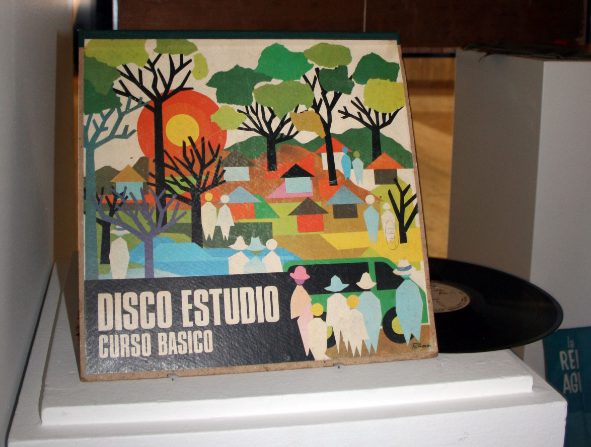 Medio de acción - Disco Estudio